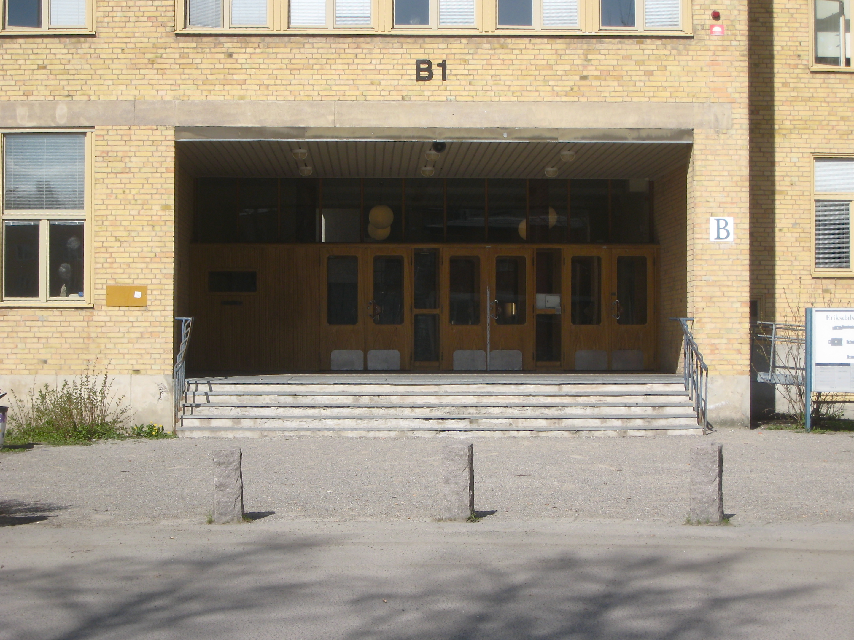 Entrance to Erikdalsskolan in april 2010.